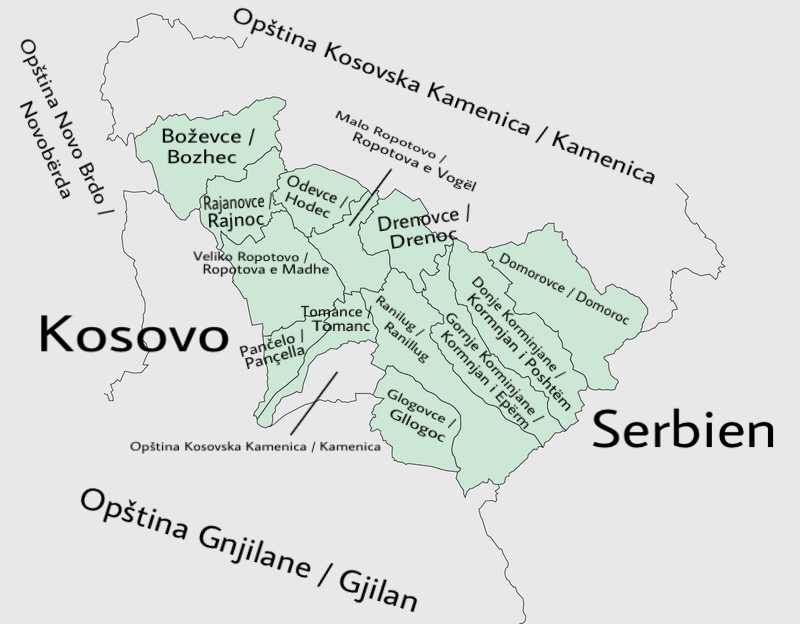 Orstteile der Gemeinde Ranilug / Ranillug in serbisch und albanischer Schrägstrichschreibweise